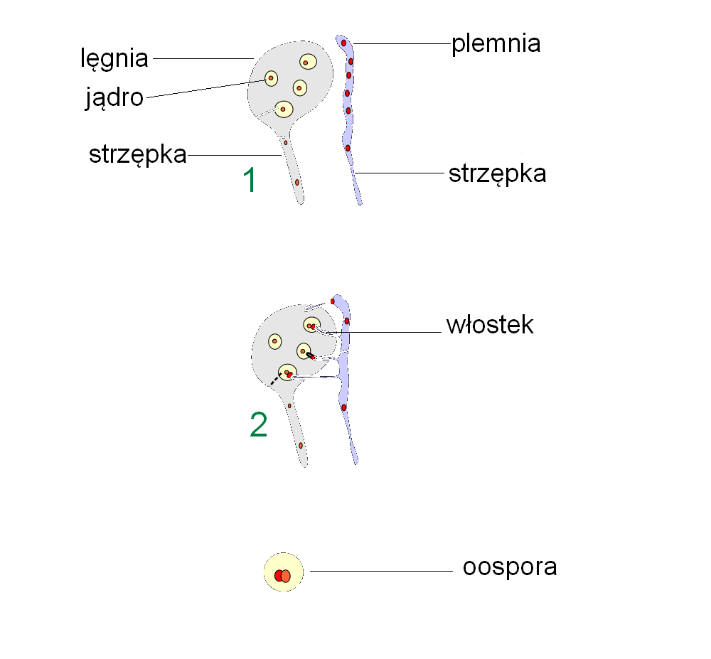 Oogamia